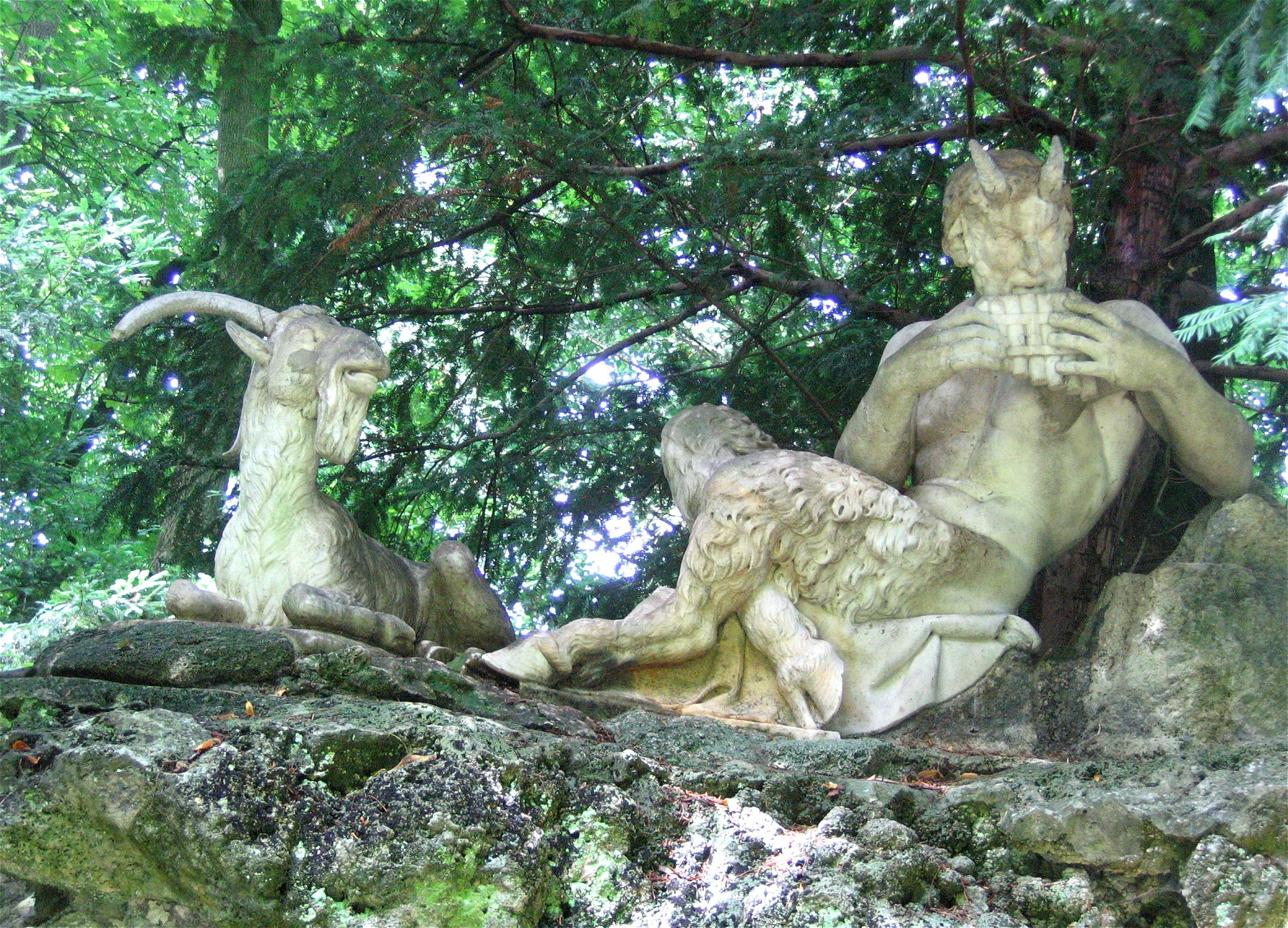 Schlosspark Nymphenburg in München, Die Gruppe des Pan, Peter Simon Lamine (1815)